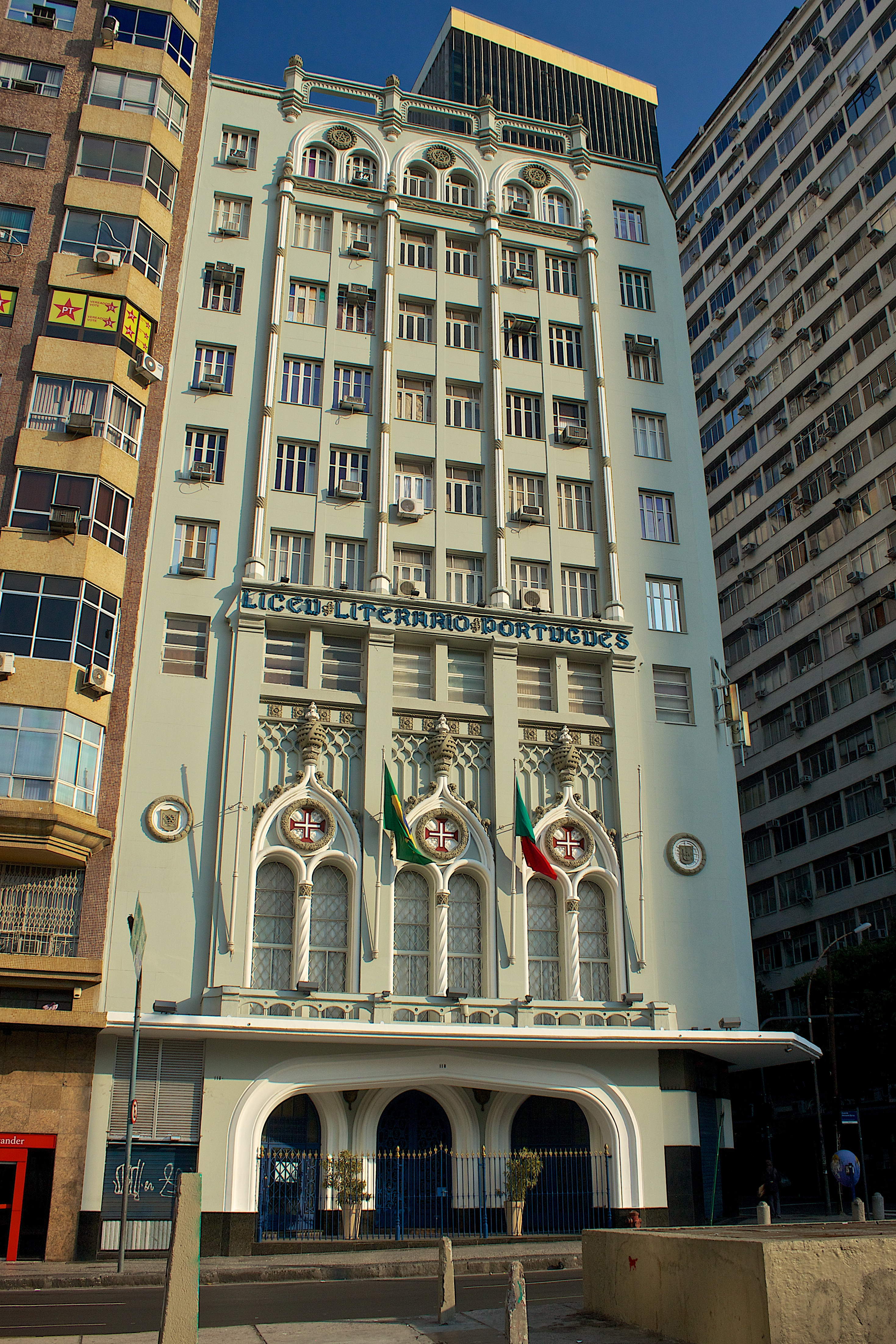 Liceu Literário Português building at the Largo da Carioca square in Rio de Janeiro, Brazil.